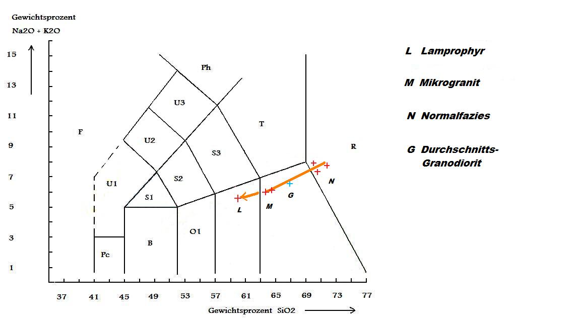 Die unterschiedlichen Gesteinsfazies des Piégut-Pluviers-Granodiorits im TAS-Diagramm